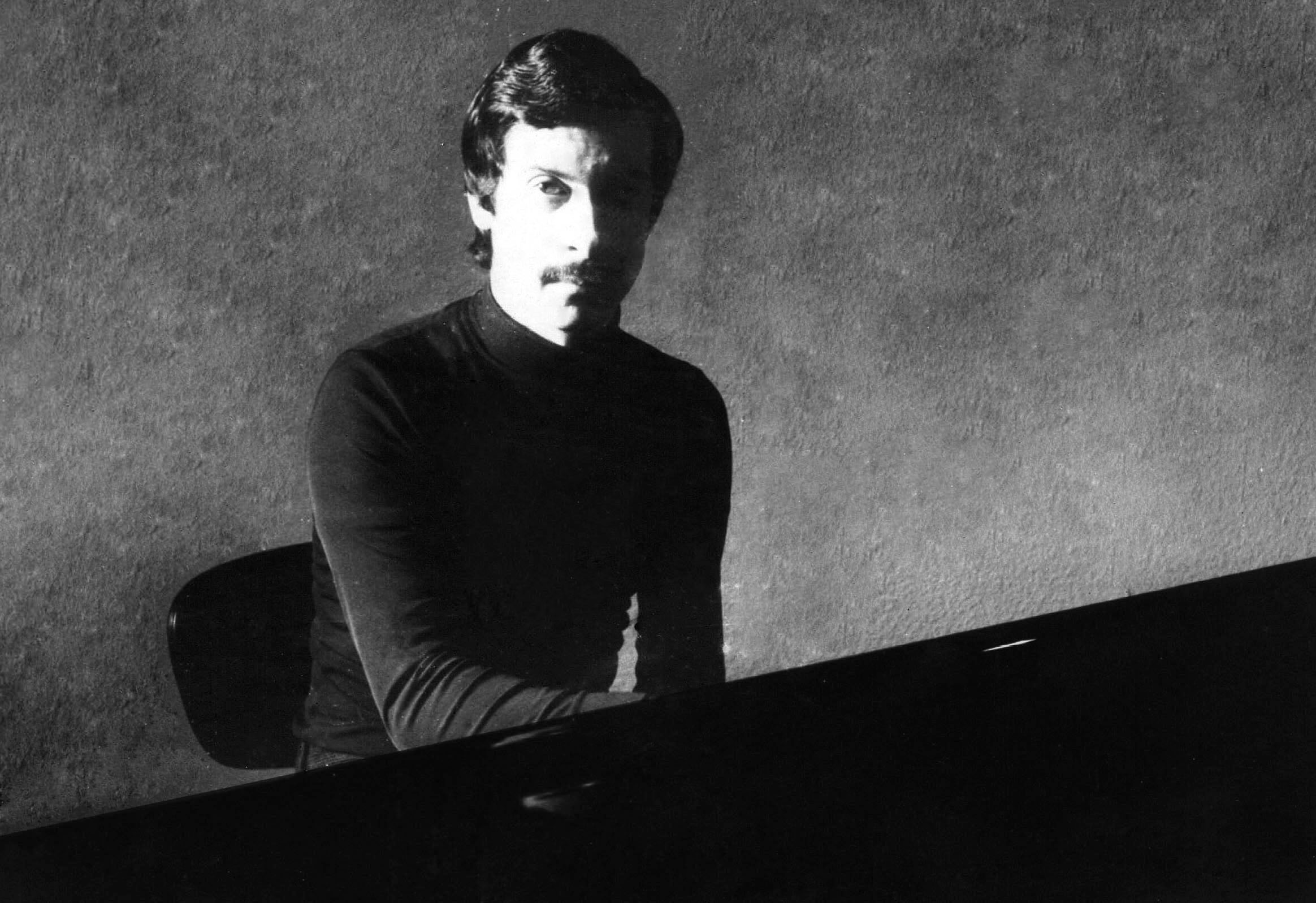 Fotografía de Jesús González Alonso